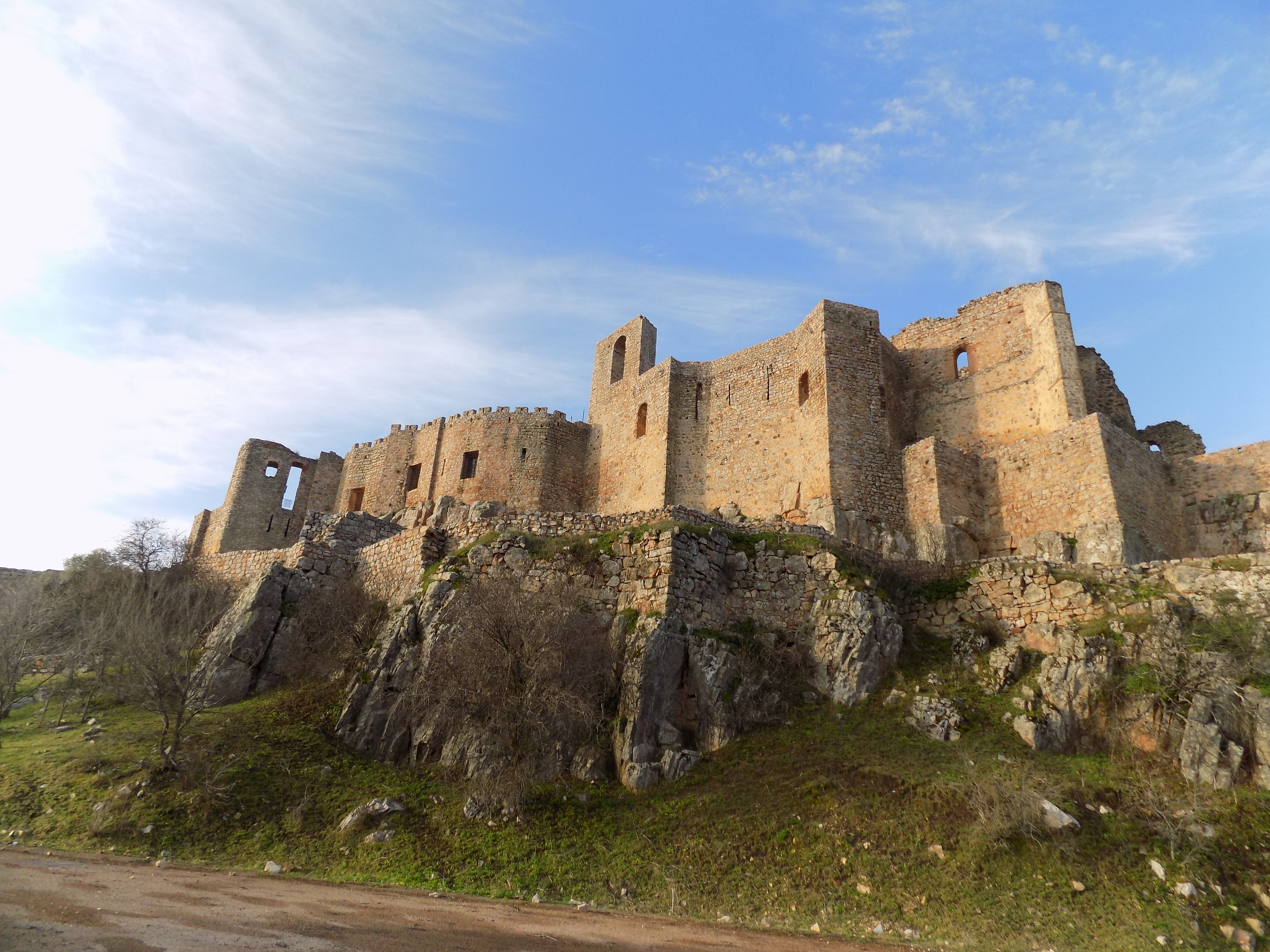 Exterior del castillo de Calatrava.